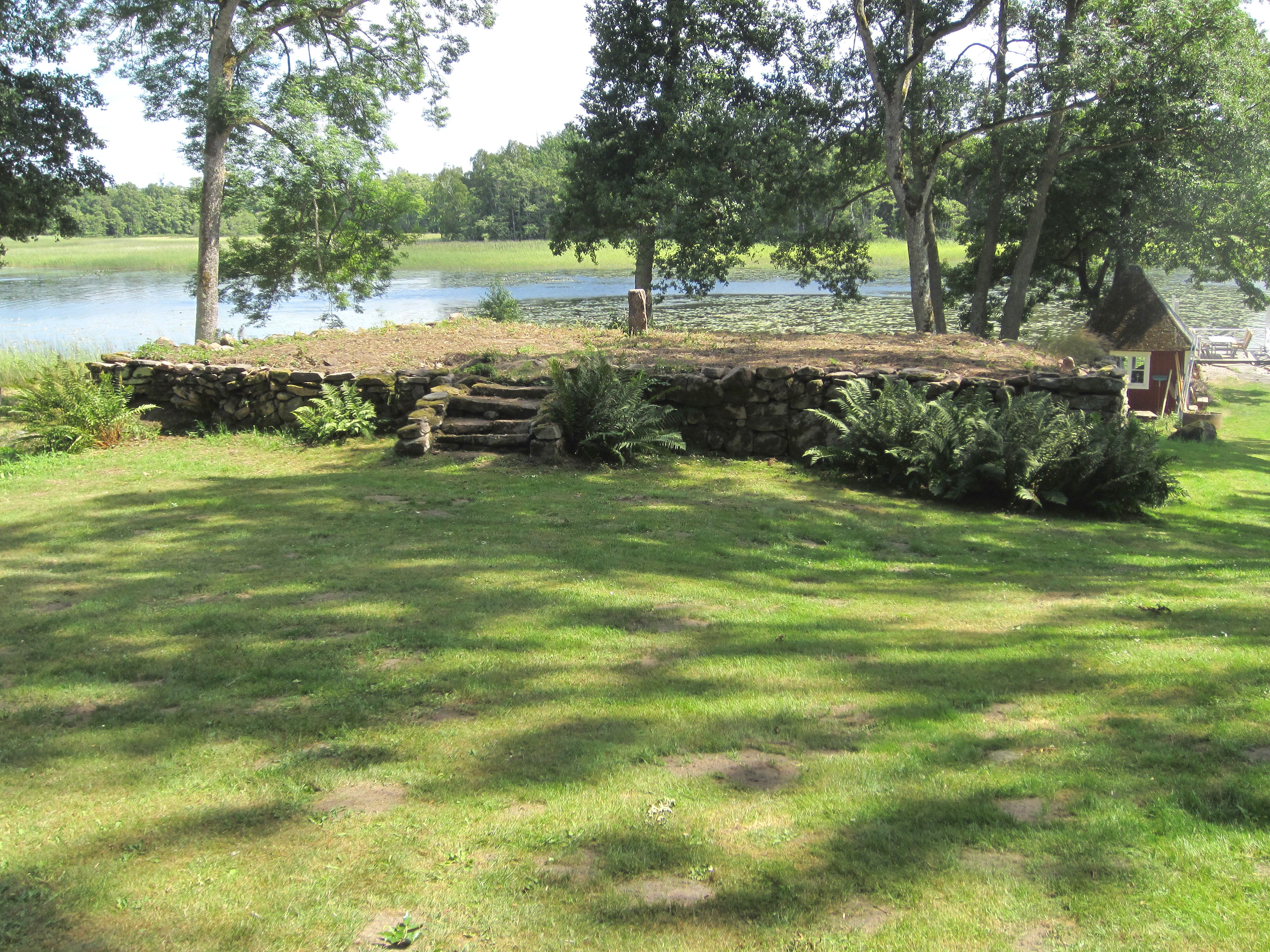 Toftanäs säteri, Bolmsö socken, Sverige.